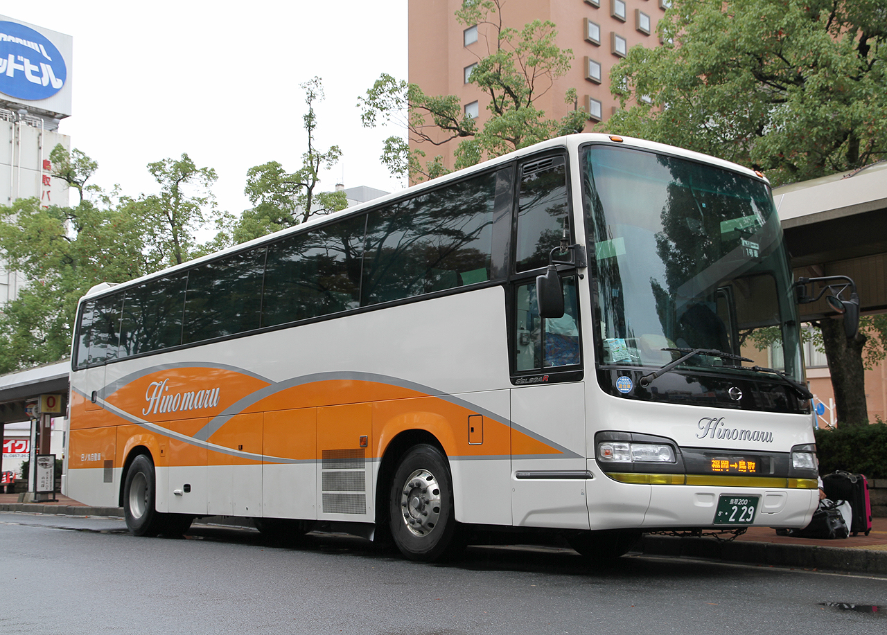 登録番号 鳥取200か･229 日ノ丸自動車㈱鳥取営業部所属 夜行高速用車両 2011年10月 鳥取バスターミナルにて撮影 撮影者 Zondag2000